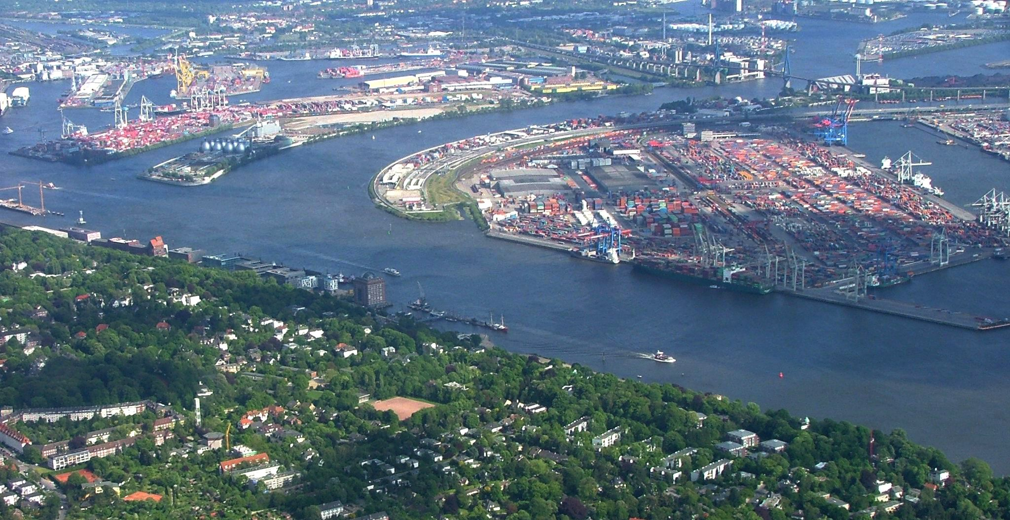 Luftaufnahme des Hamburger Containerhafens mit Köhlbrandbrücke (re. ob.) und Stadtteil Othmarschen (vorn rechts). Nahe der Bildmitte (links davon) ist das Seniorenstift Augustinum Hamburg mit seiner Glaskuppel zu erkennen, das ehemalige Union-Kühlhaus in Hamburg-Ottensen (vorn links) mit Ortsteil und Fähranleger Neumühlen. Blick Richtung Südosten